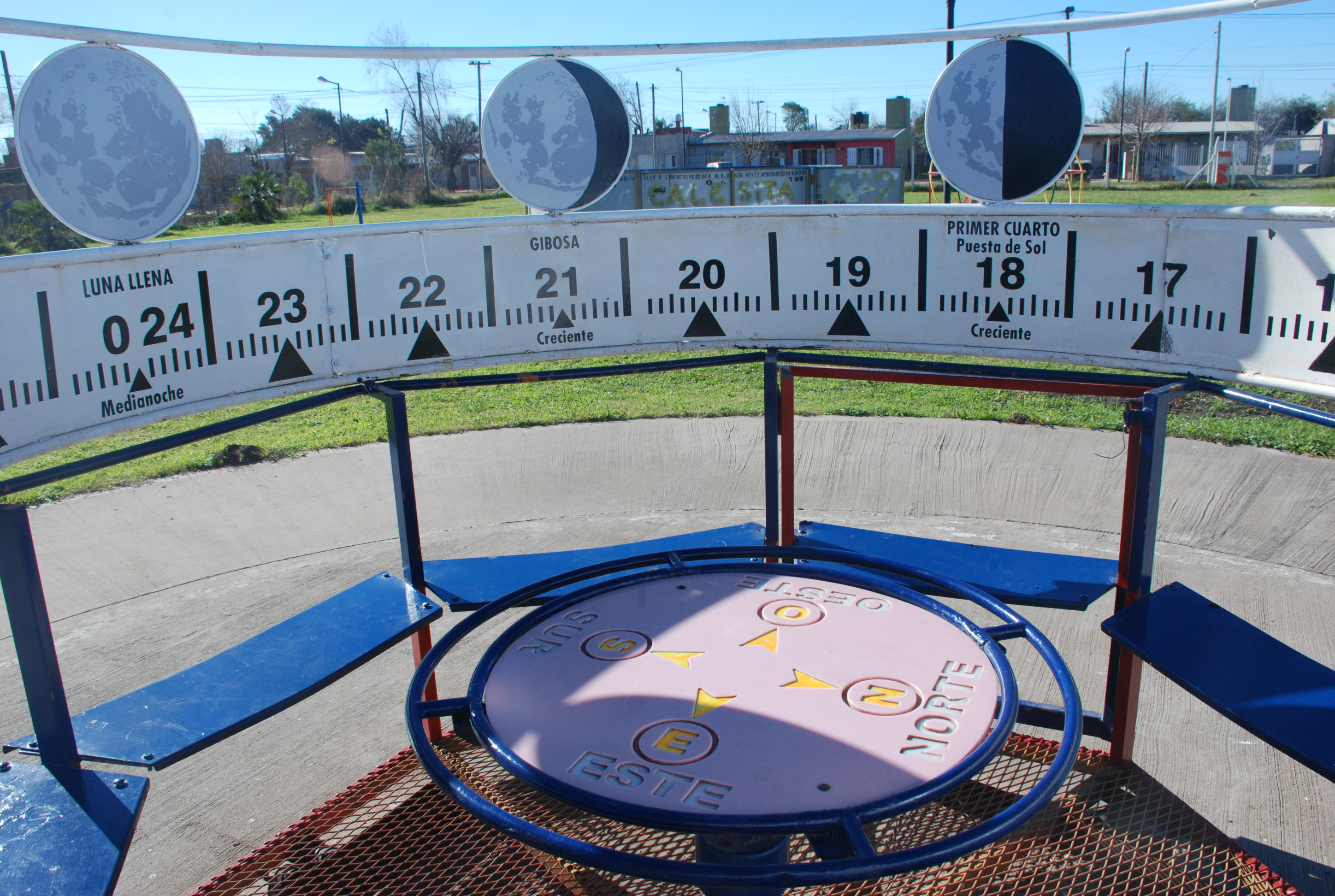 Interior de la Calesita lunar del Parque Cielos del Sur, Chivilcoy, provincia de Buenos Aires.